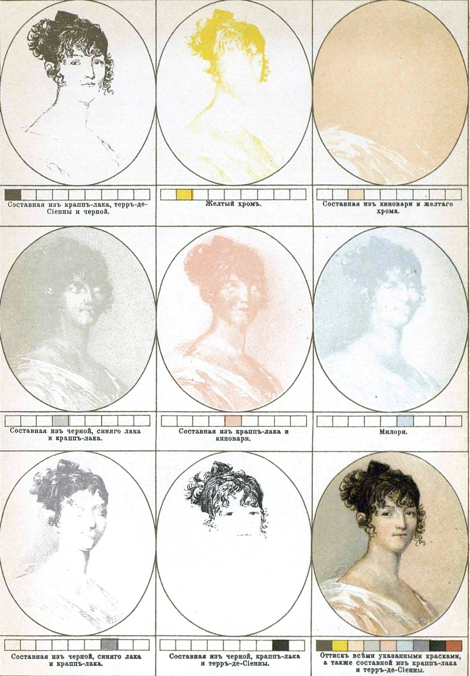 Принцип цветной литографии. На рисунке мать Пушкина, Н.О. Пушкина. По миниатюре на слоновой кости; См. I-й том сочинений Пушкина под ред. С.А. Венгерова